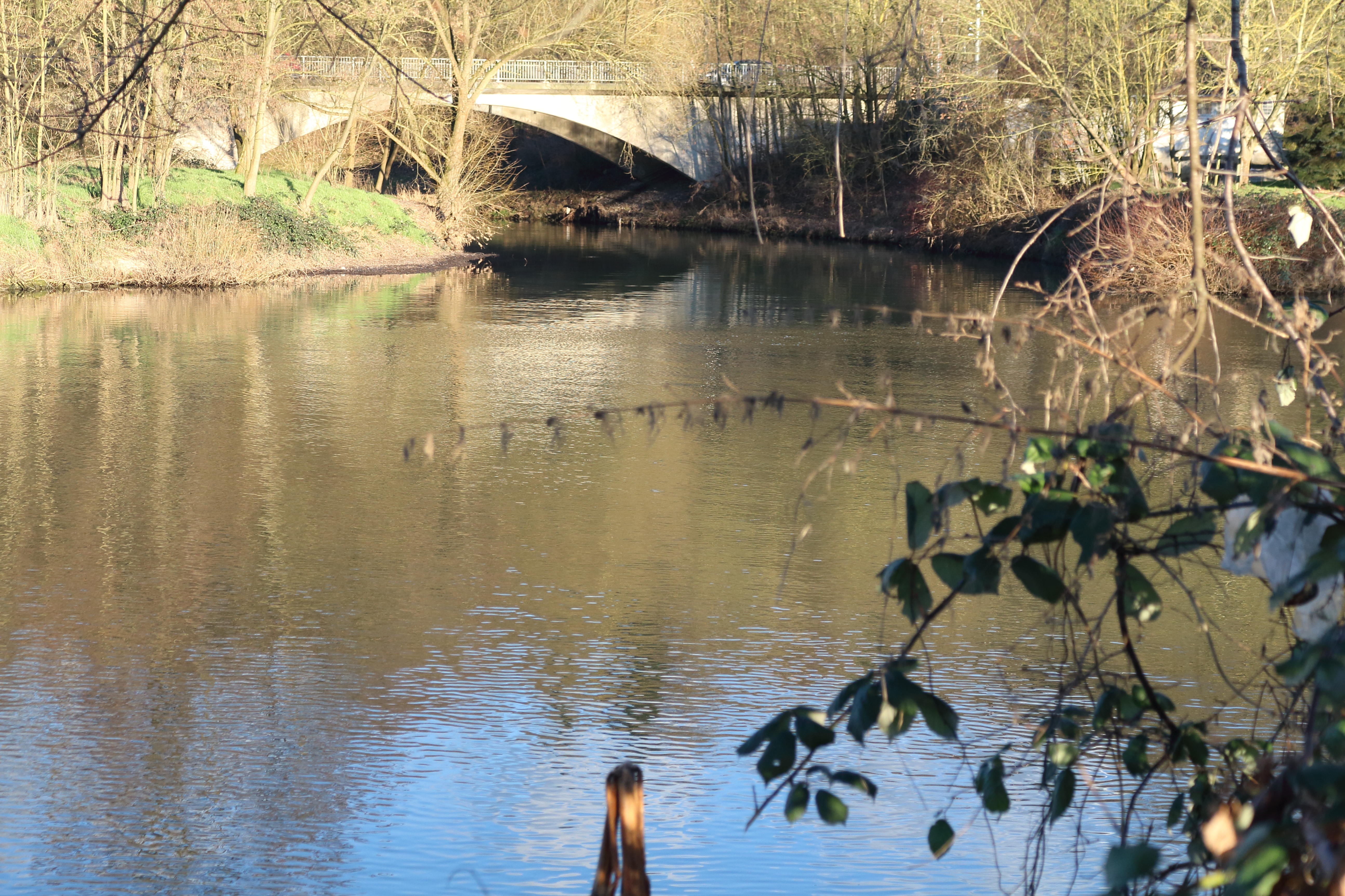 Neckar, hier von rechts nach links fließend mit der Einmündung der Murr auf der gegenüber liegenden Seite